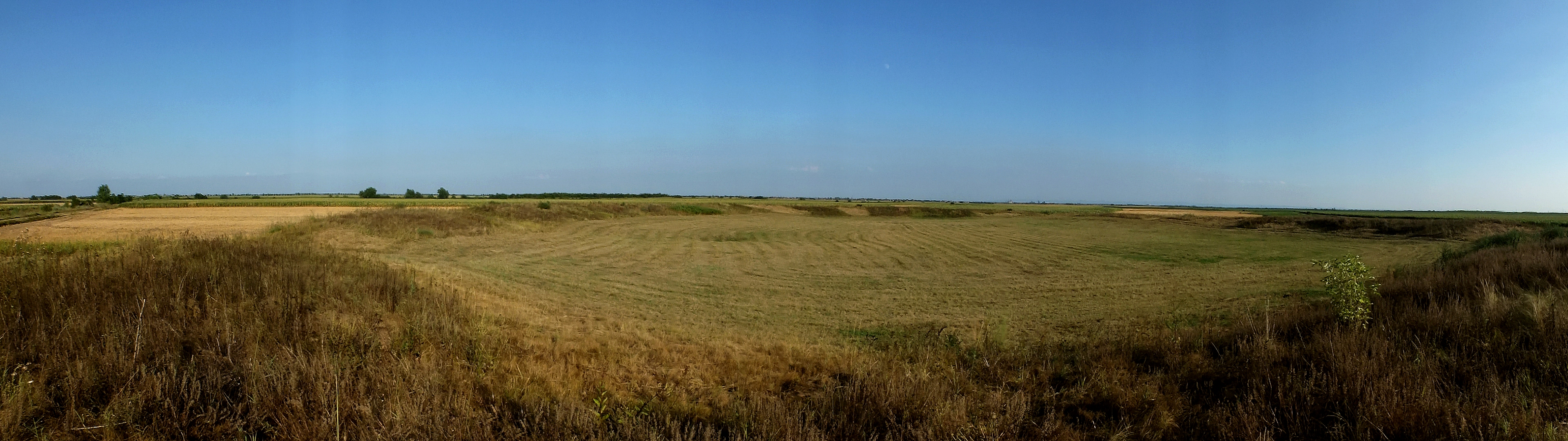 Земљано утврђење „Чарнок“ код Врбаса (келтски опидум),налази се између Врбаса и Бачког Доброг Поља,око 2 км Западно од магистрално пута који спаја ова два места........."Доласком Келта на ова подручја у другој половини 4. века п.н.е, Чарнок постаје келтски опидум, и првенствено представља трговачки центар а касније добија и одбрамбену улогу. Од 1.века нове ере ови простори су део тзв. барбарикума који се налази наспрам Римског царства и доживљава директне утицаје Римске цивилизације. Истовремено долази до насељавања Сармата, припадника иранских народа, који доносе и грчко-хеленистичке културне утицаје. Од 4. века наше ере просторе запљускују таласи народа који су ношени великом сеобом народа......"